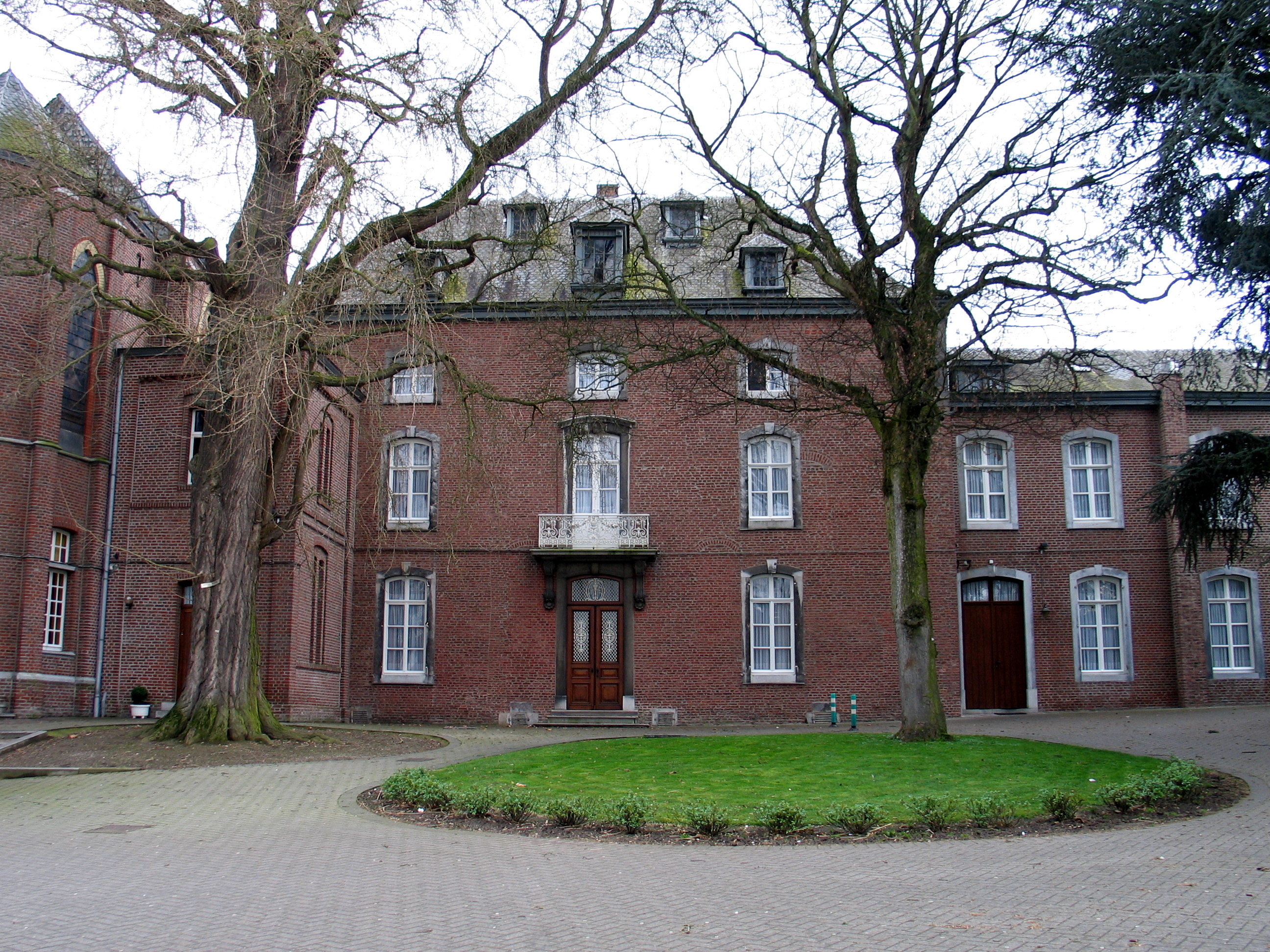 het kasteel de Brouckmans in Hoeselt, België